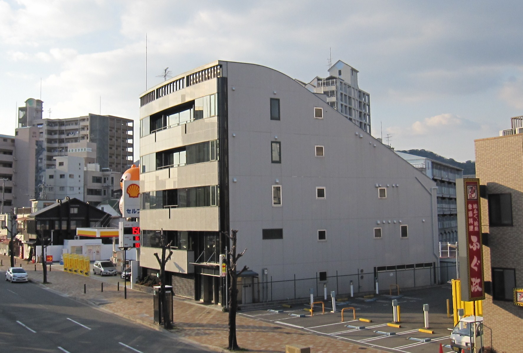 ビオフェルミン製薬本社